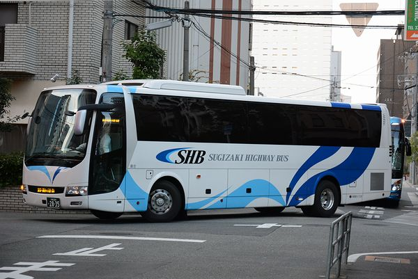 Basa Jawa: 高速路線バス